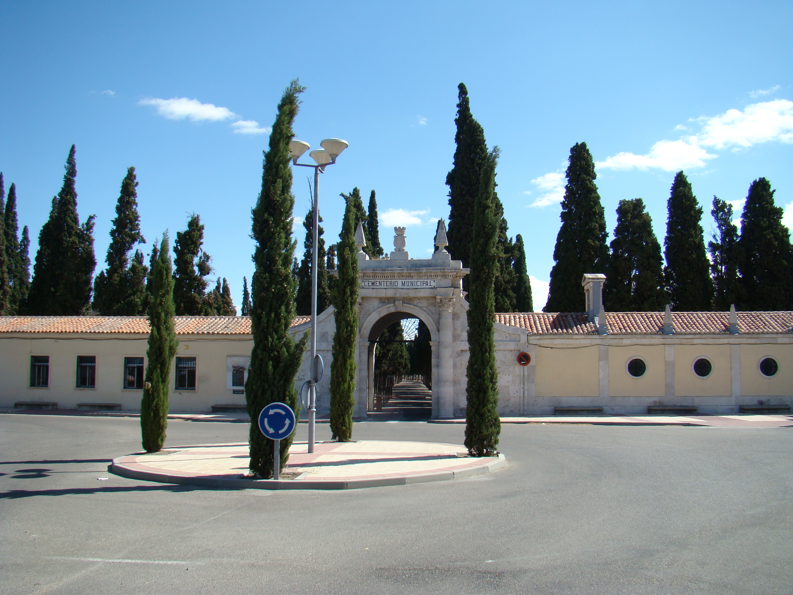 Fachada principal del cementerio municipal de Valladolid (España).